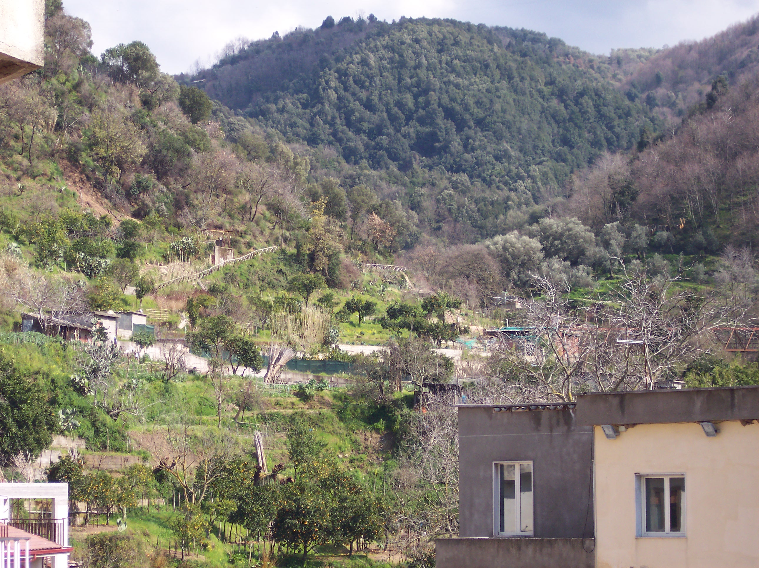 La parte rurale di Acquaro sopra le colline delle Serre Vibonesi